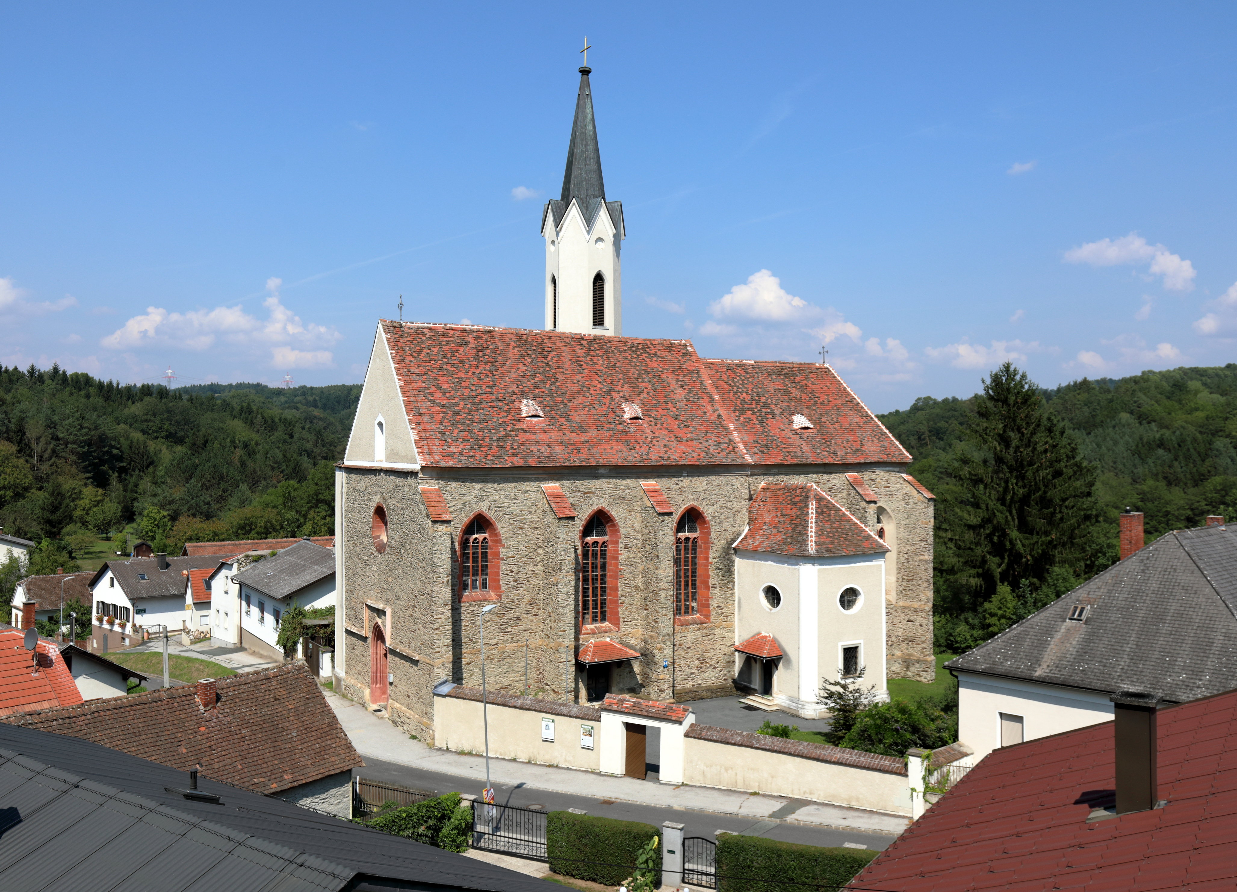 Südansicht der röm.-kath. Pfarrkirche hl. Josef in der burgenländischen Stadtgemeinde Stadtschlaining.Die Kirche ist der erhaltene Teil, der von Andreas Baumkirchner um 1460 errichteten Pauliner-Klosteranlage. Der dreigeschossige schlanke Turm mit Spitzhelm stammt aus der Mitte des 19. Jahrhunderts.